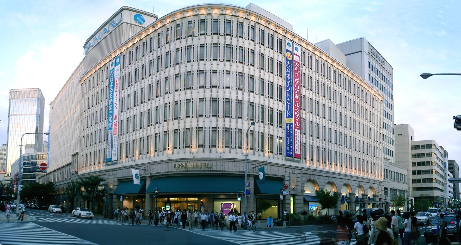 Daimaru_kobe_Kyuiryuchi.jpg